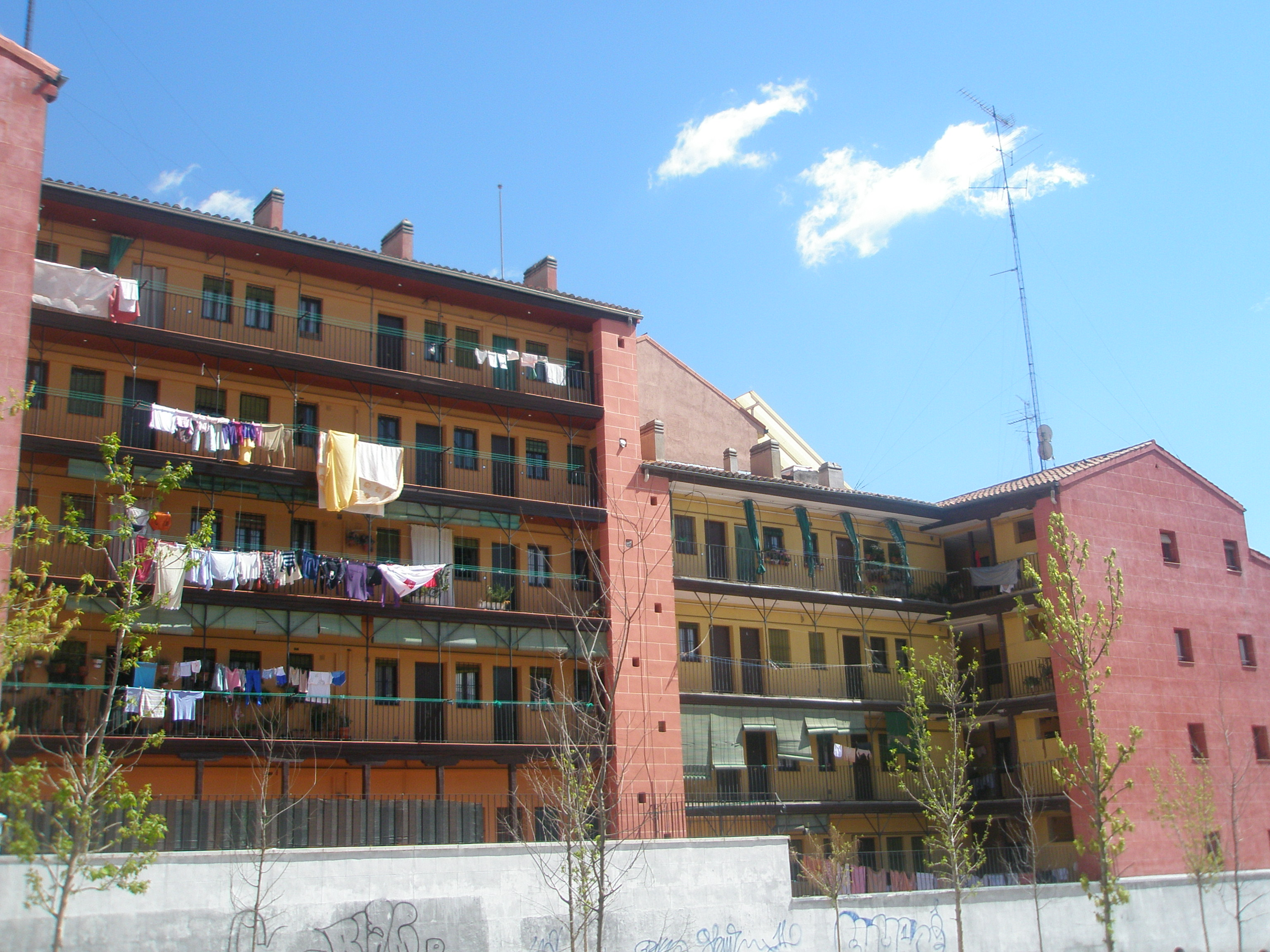 Lavapies Corrala